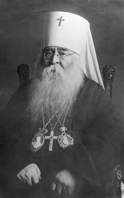 Митрополит Сергий (Страгородский)